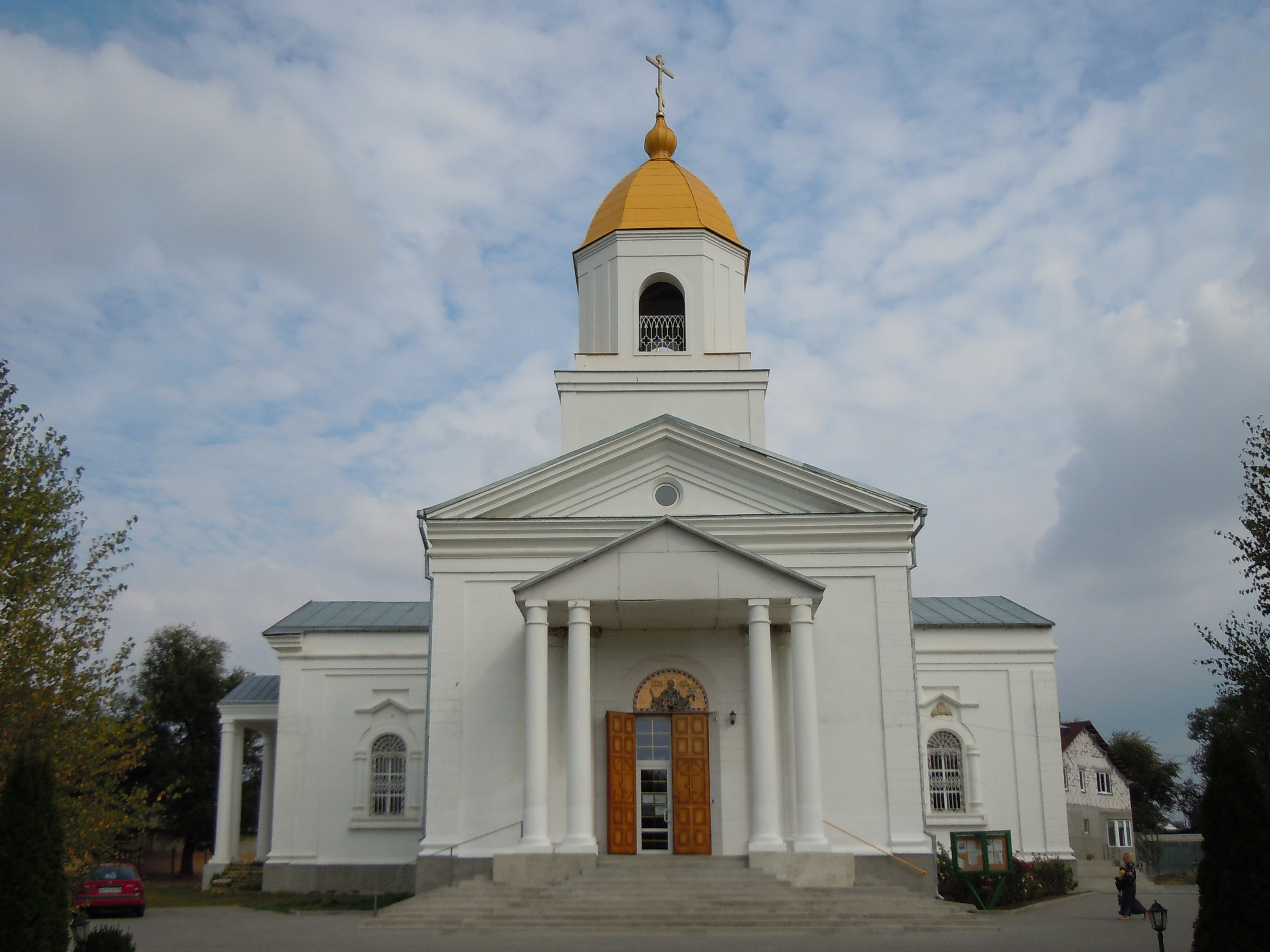 Миколаївська церква (Михайлівська), Болград, пр-т Леніна, ріг вул. А. Христєва і Варненської